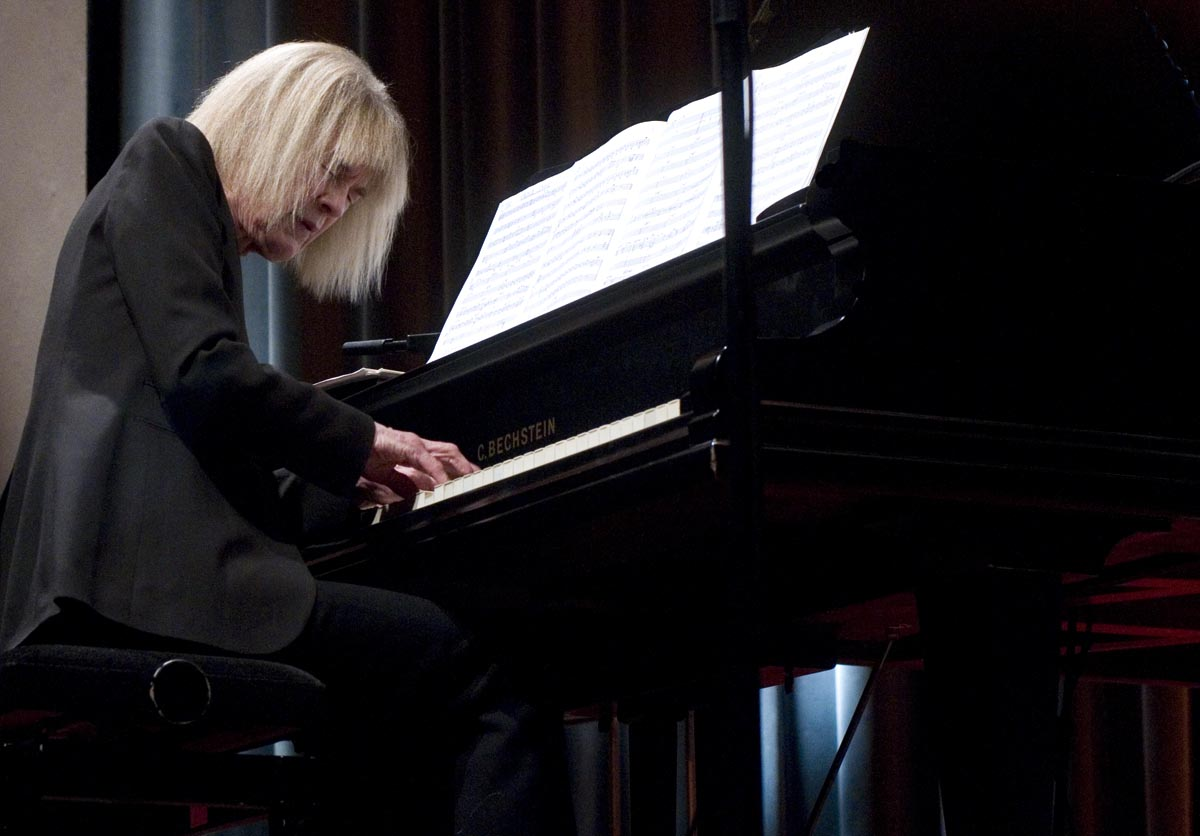 Carla Bley & The Lost Chords @ Babylon, Berlin, Germany (eine Veranstaltung der Jazzwerkstatt)